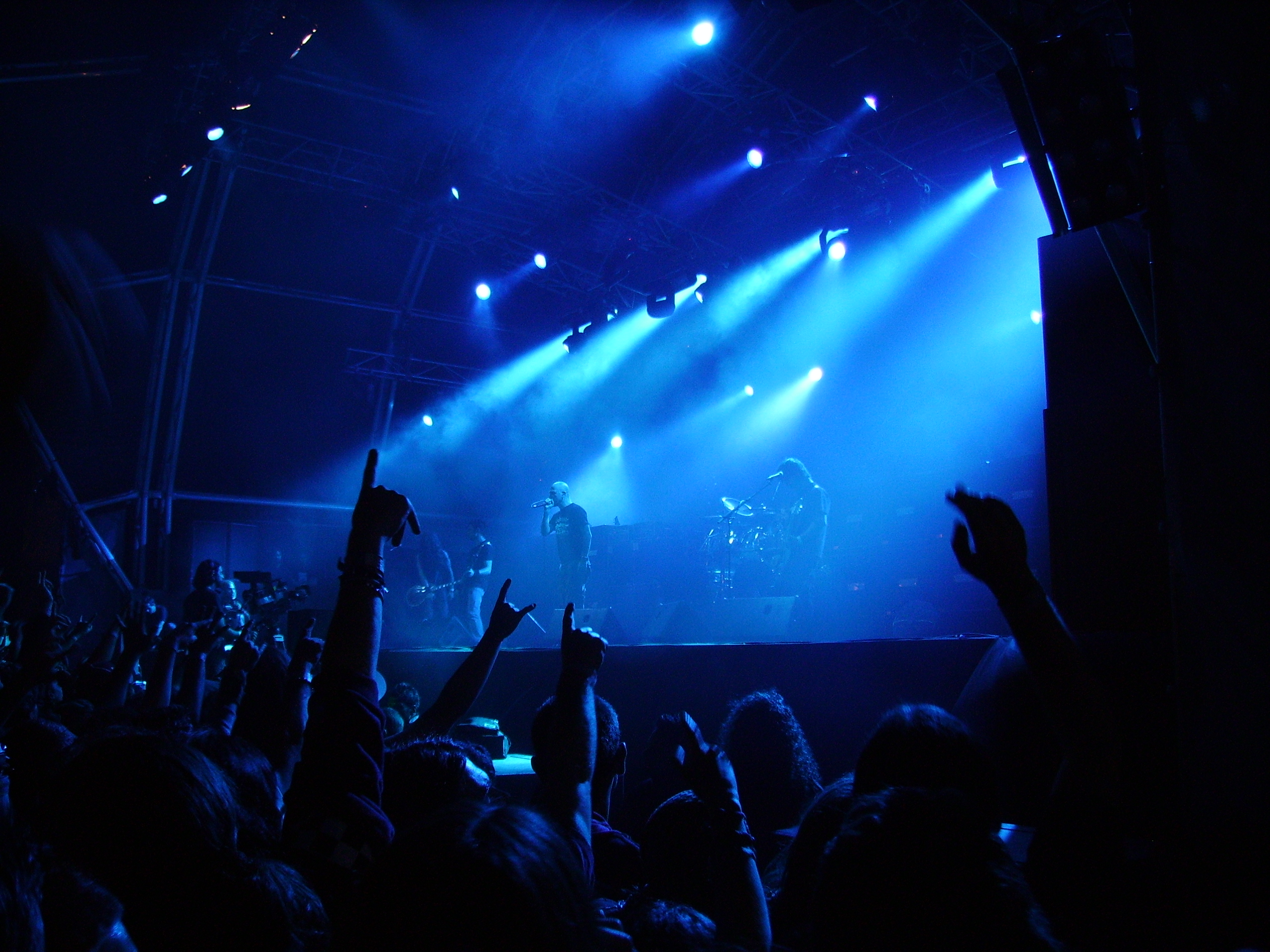 Soziedad Alkoholika en el Viñarock en 2008